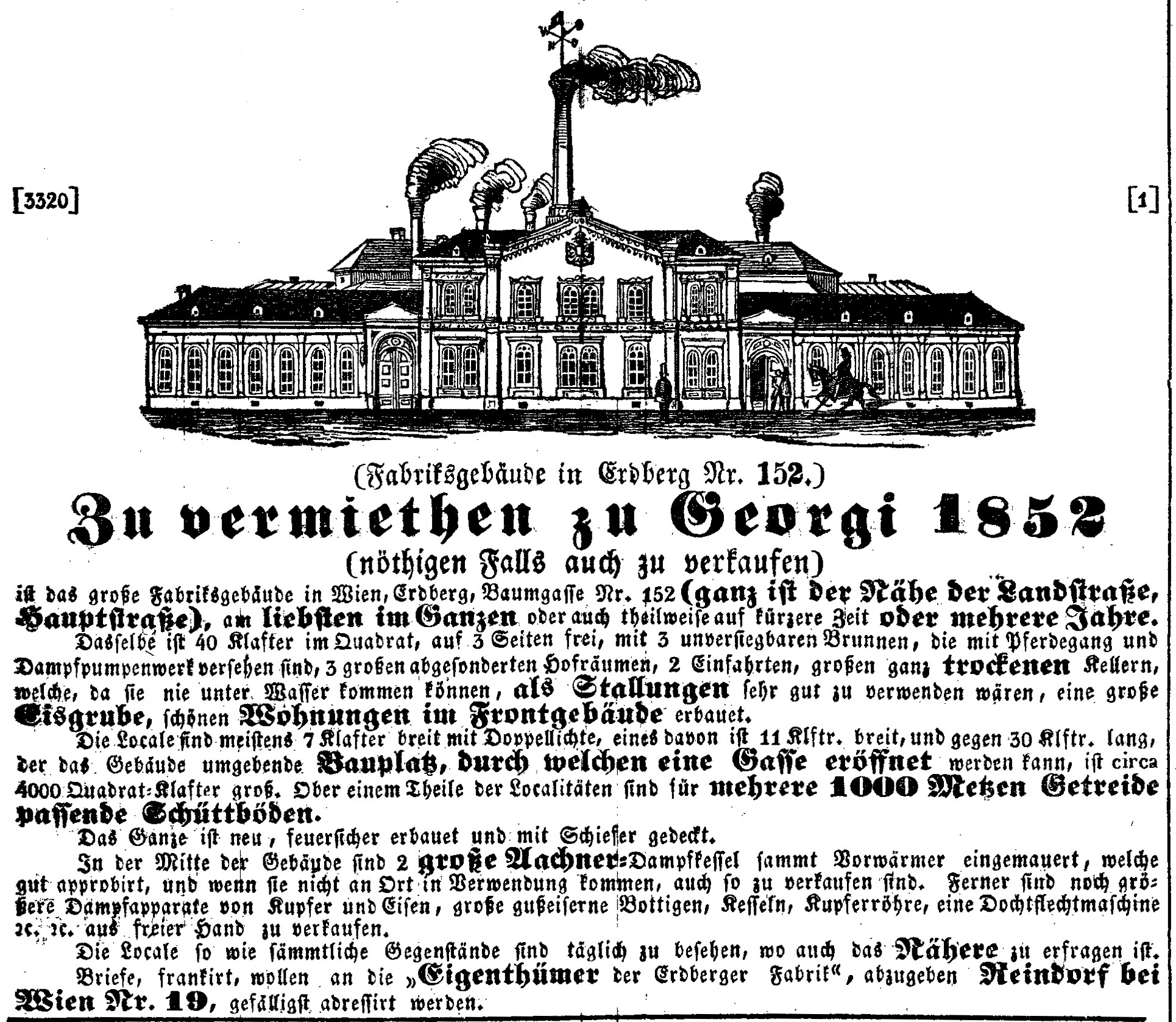 Wien-Landstraße (3. Wiener Gemeindebezirk), Baumgasse Nr. 152 (heute: 37–39) Kerzenfabrik des Josef Krimsky, ab 1860: Krimsky-Kaserne